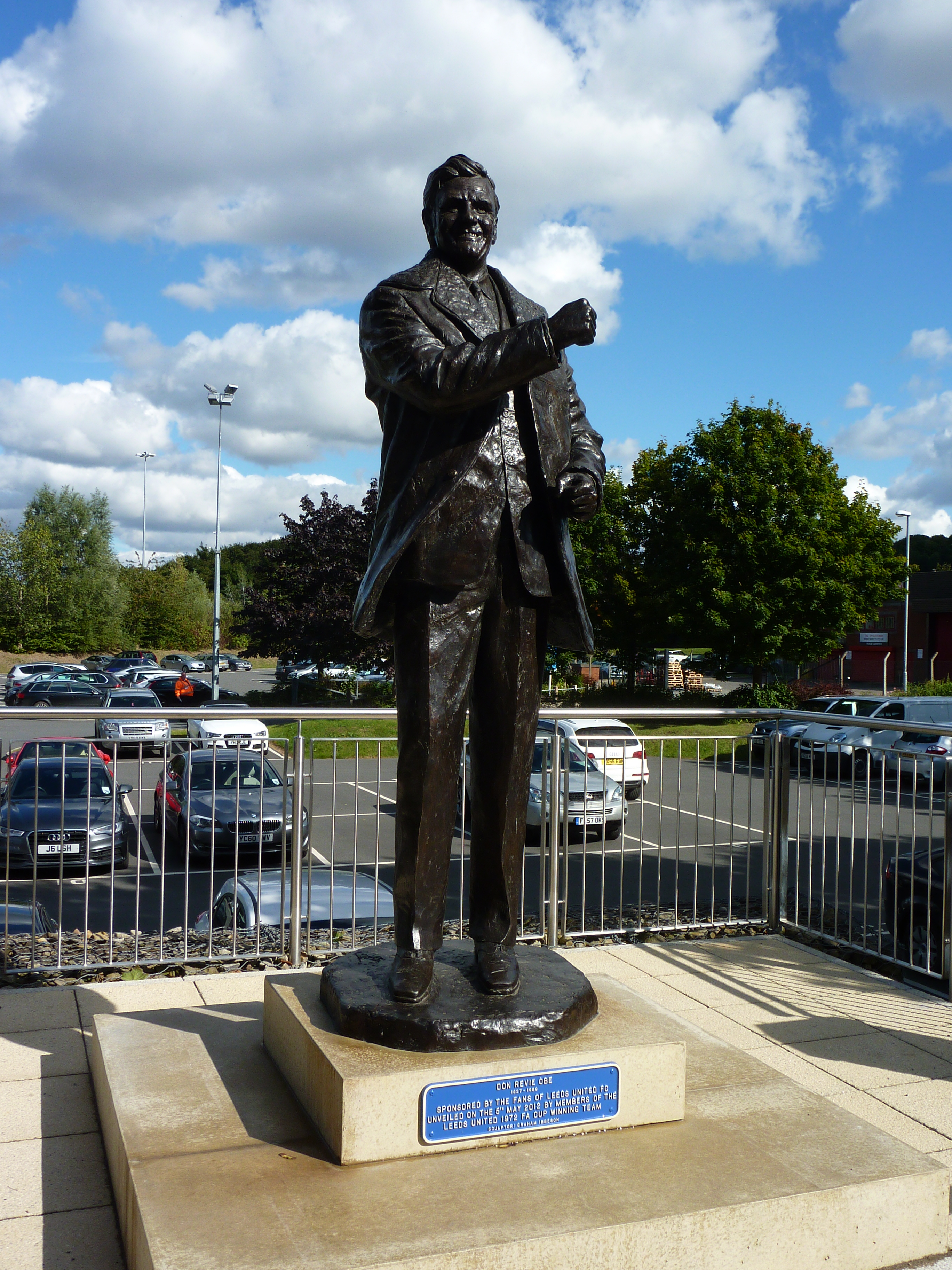 Don Revie statue outside Elland Road in Leeds.